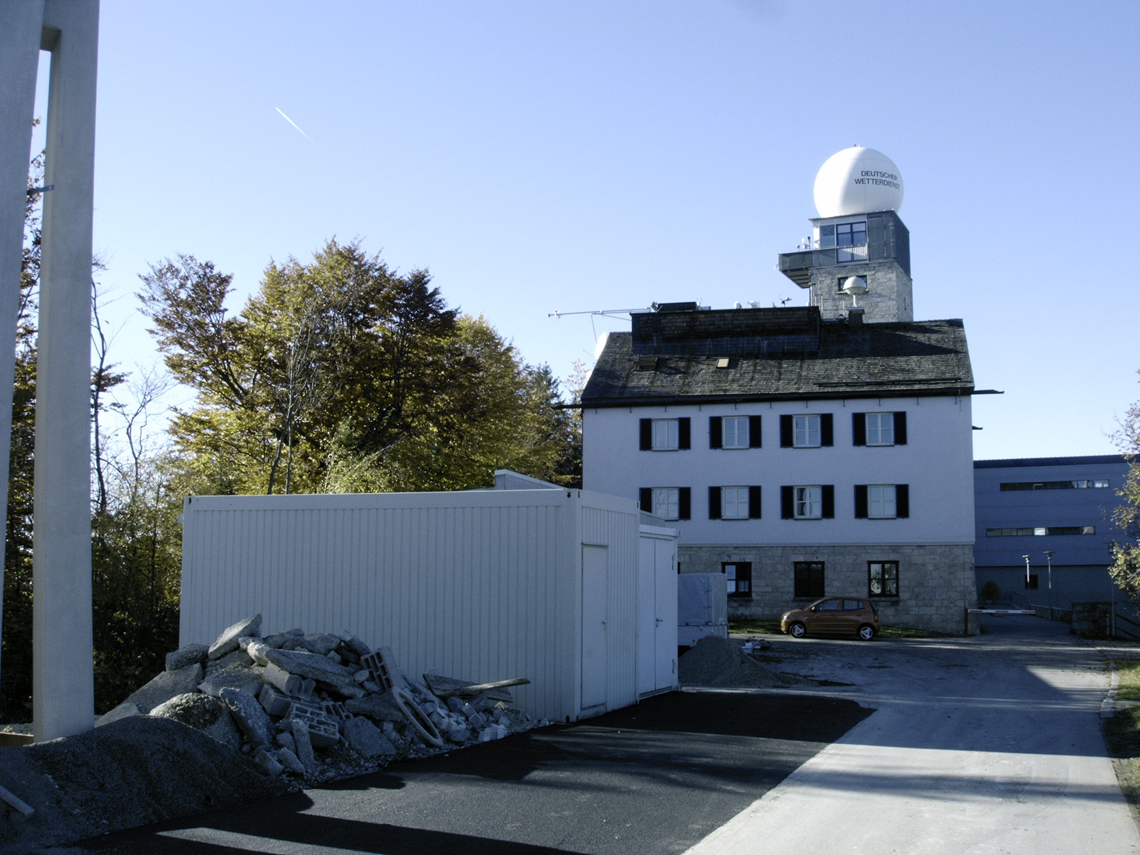 Hohenpeißenberg Observatorium Wetterwarte